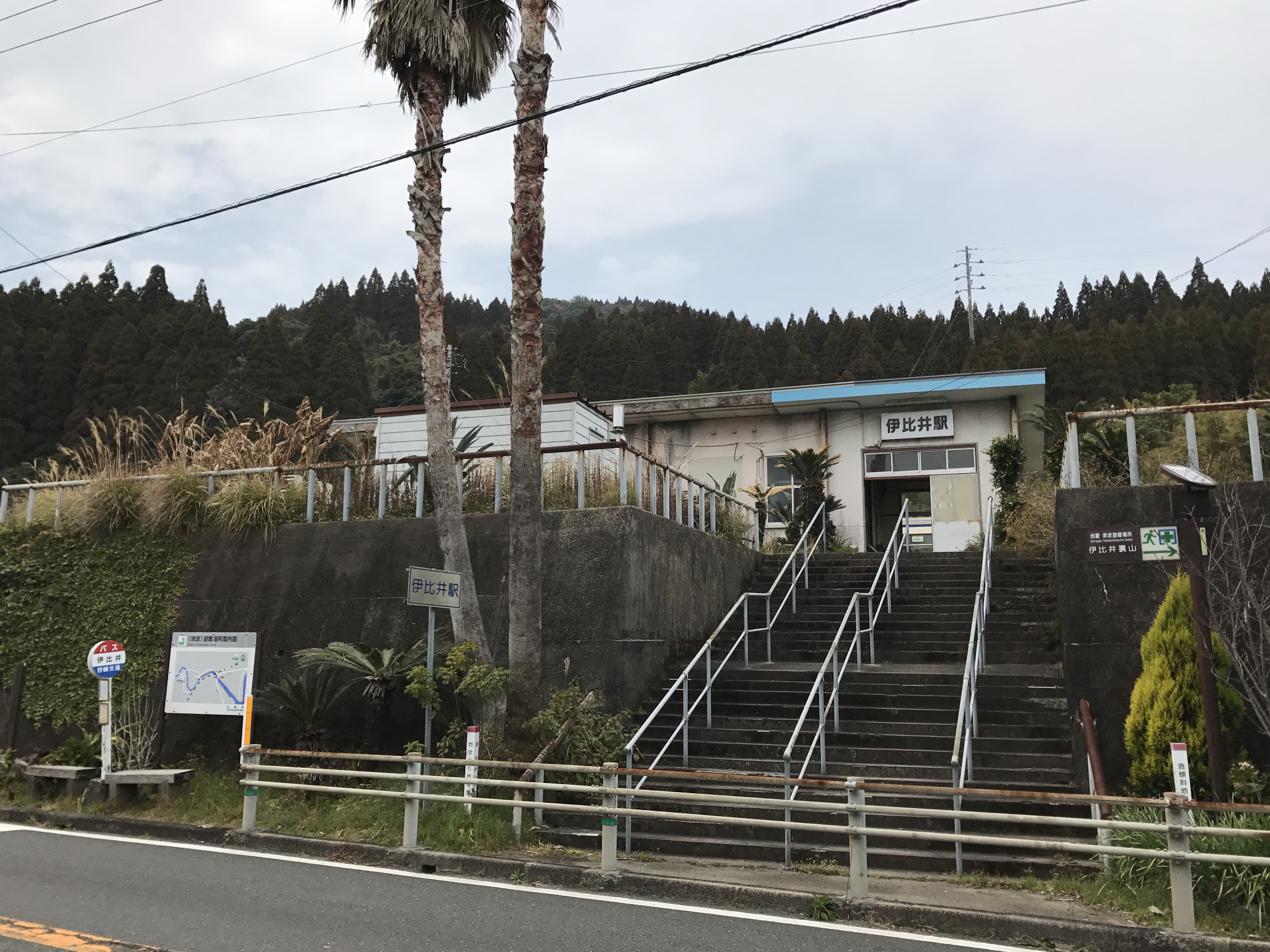 伊比井駅の遠景